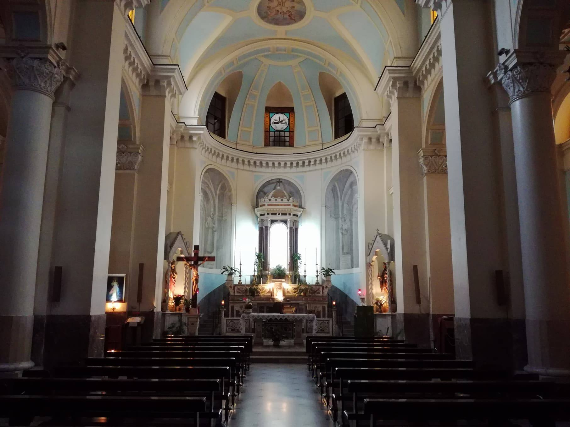 Abside della chiesa di San Francesco d'Assidi a Mergellinas (Napoli)